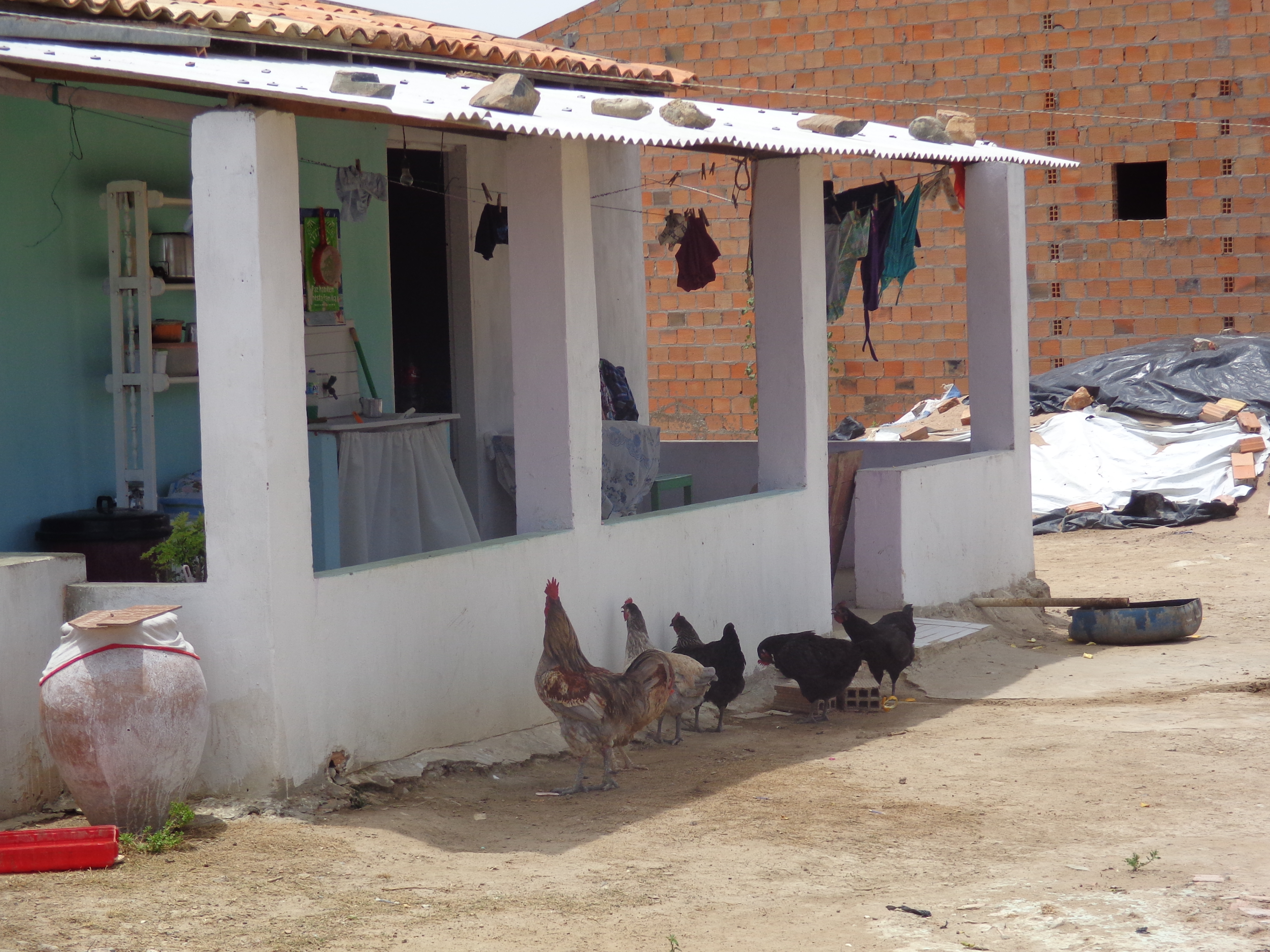 Casas tipicas do Sertão